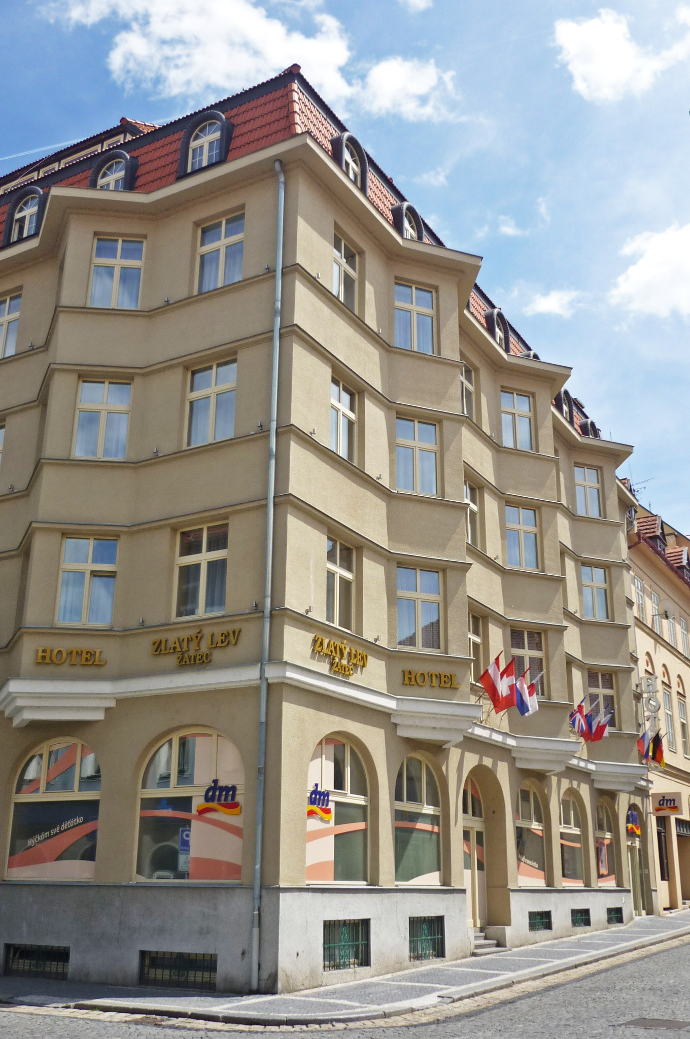 Saaz, Stadthaus Nr. 228, Hotel "Goldener Löwe"